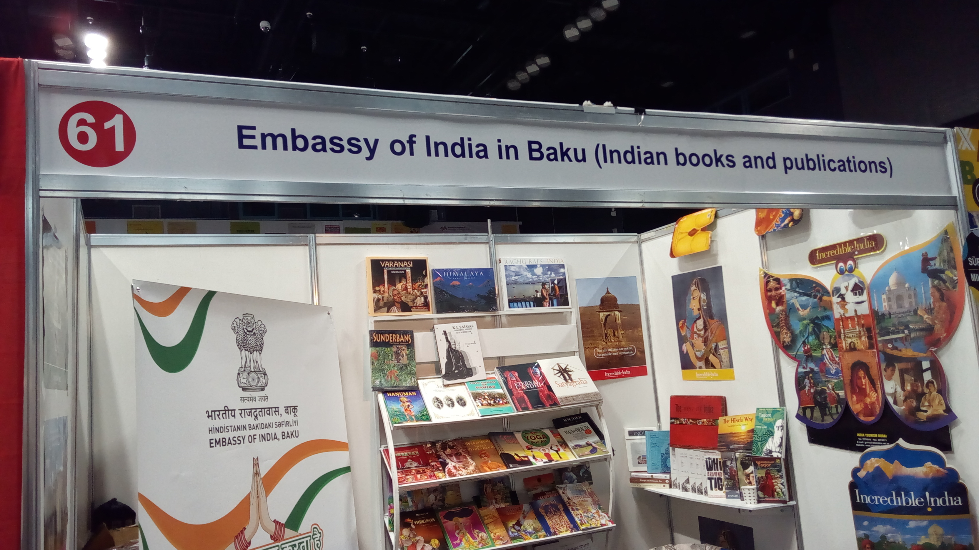 V Bakı Beynəlxalq Kitab Sərgi-Yarmarkası